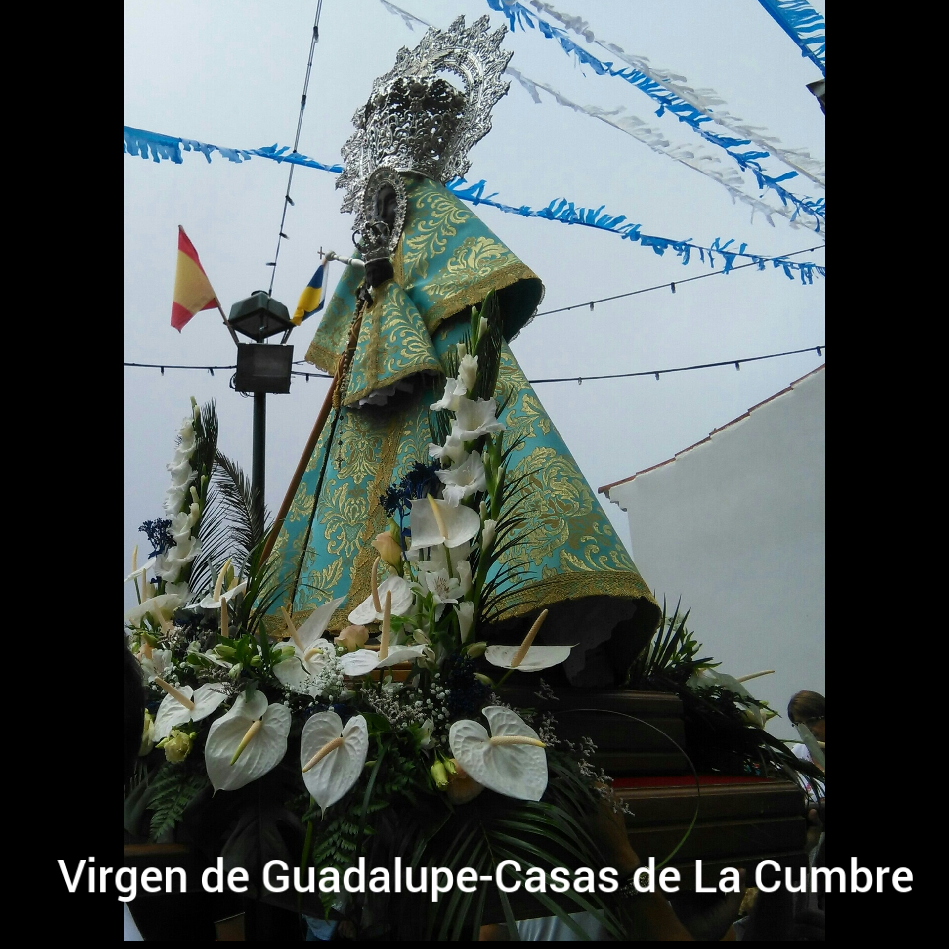 VIRGEN